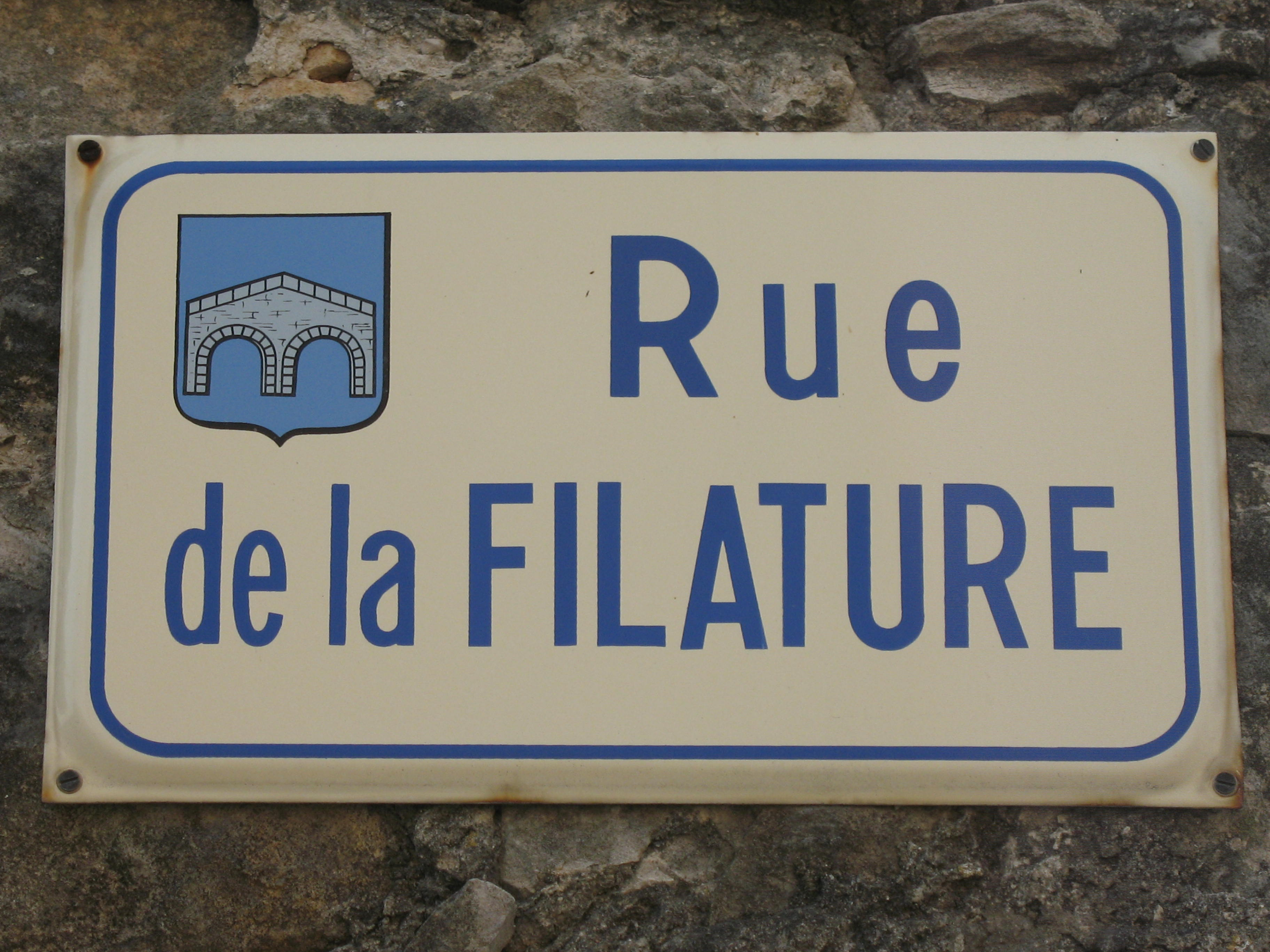 Plaque de rue de Pompignan, dans le Gard, avec blason de la ville